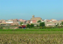 Panoràmica de Linyola